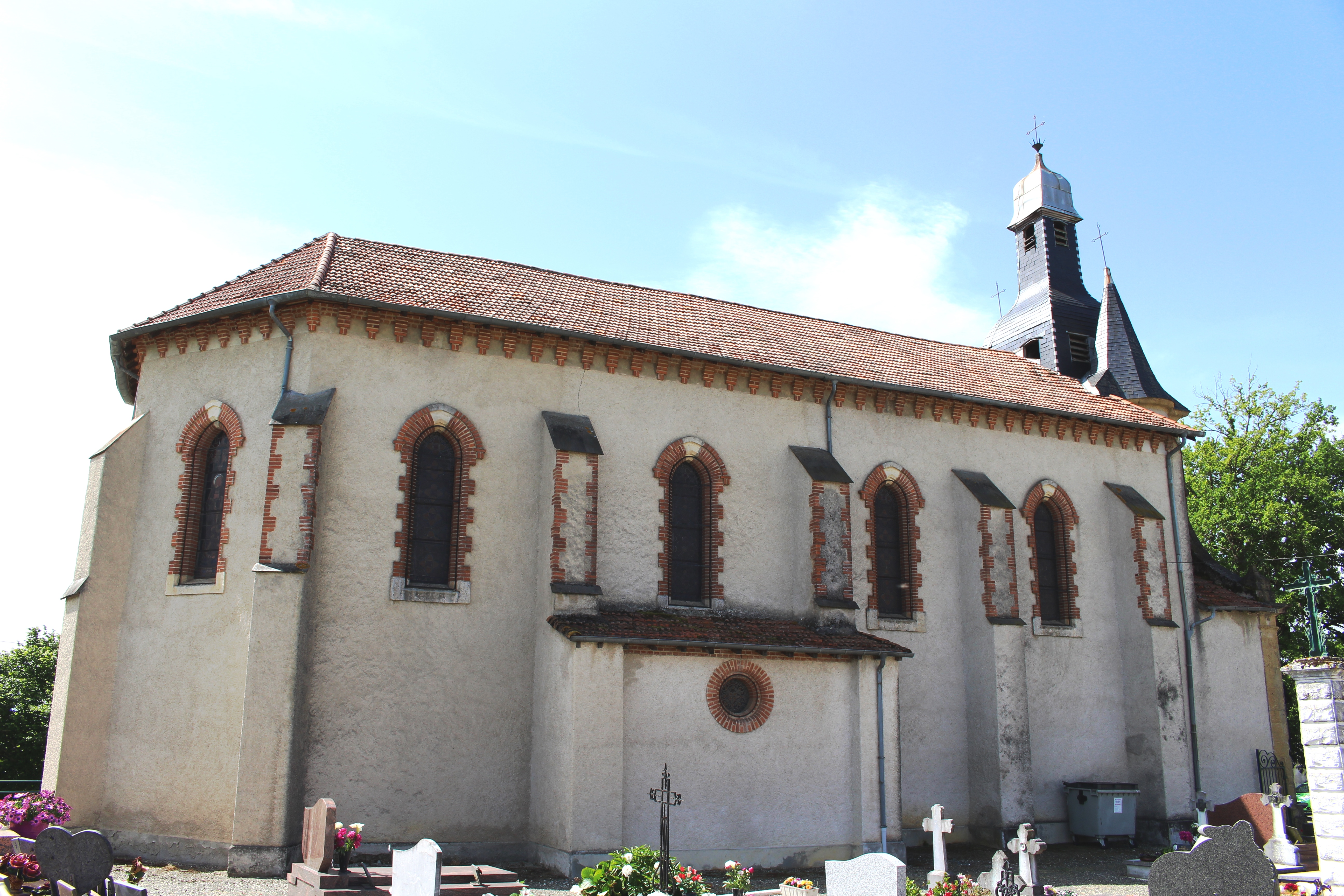 Église Saint-Martin de Bouilh-Péreuilh (Hautes-Pyrénées)